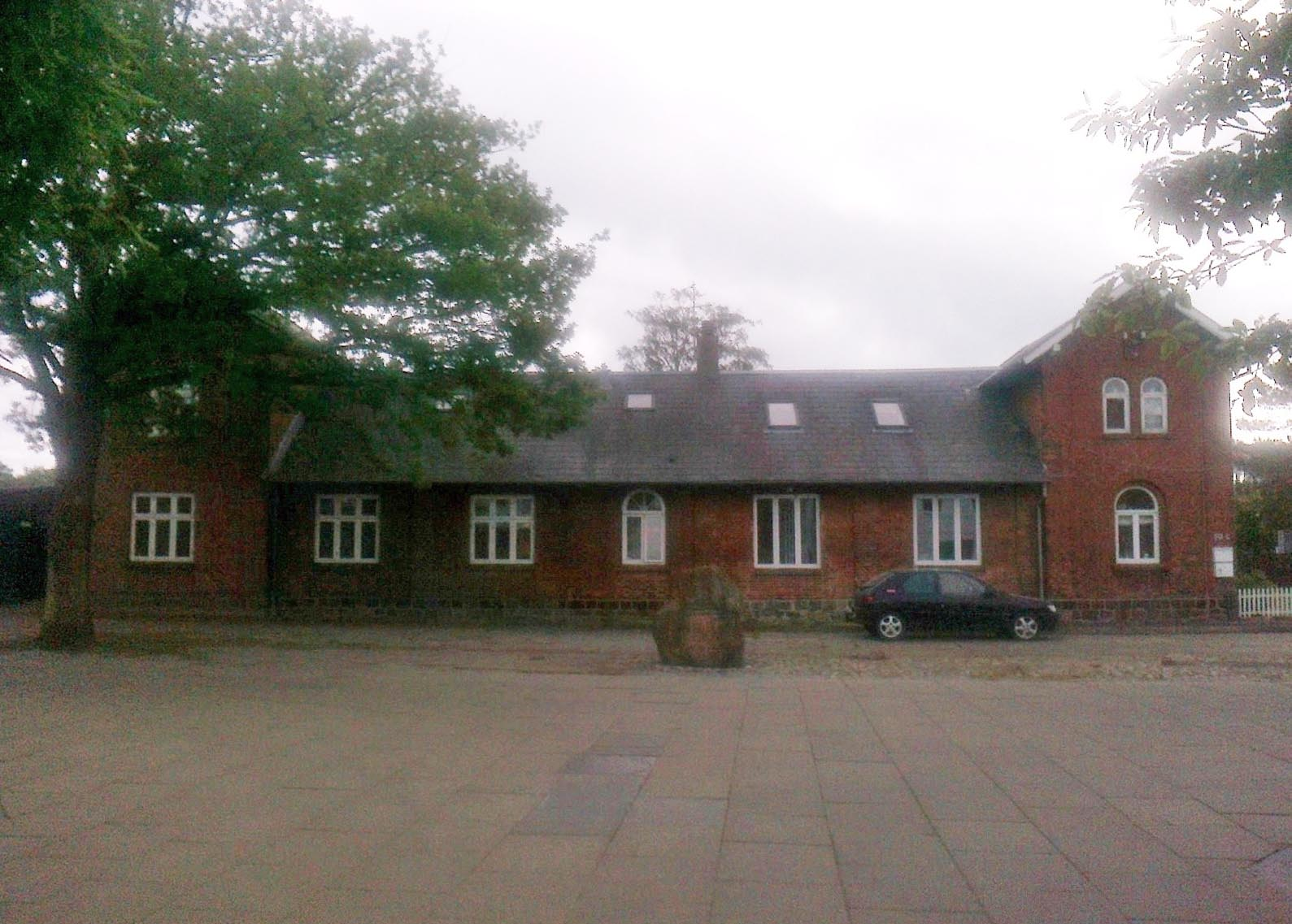 Hov Station fra vejsiden